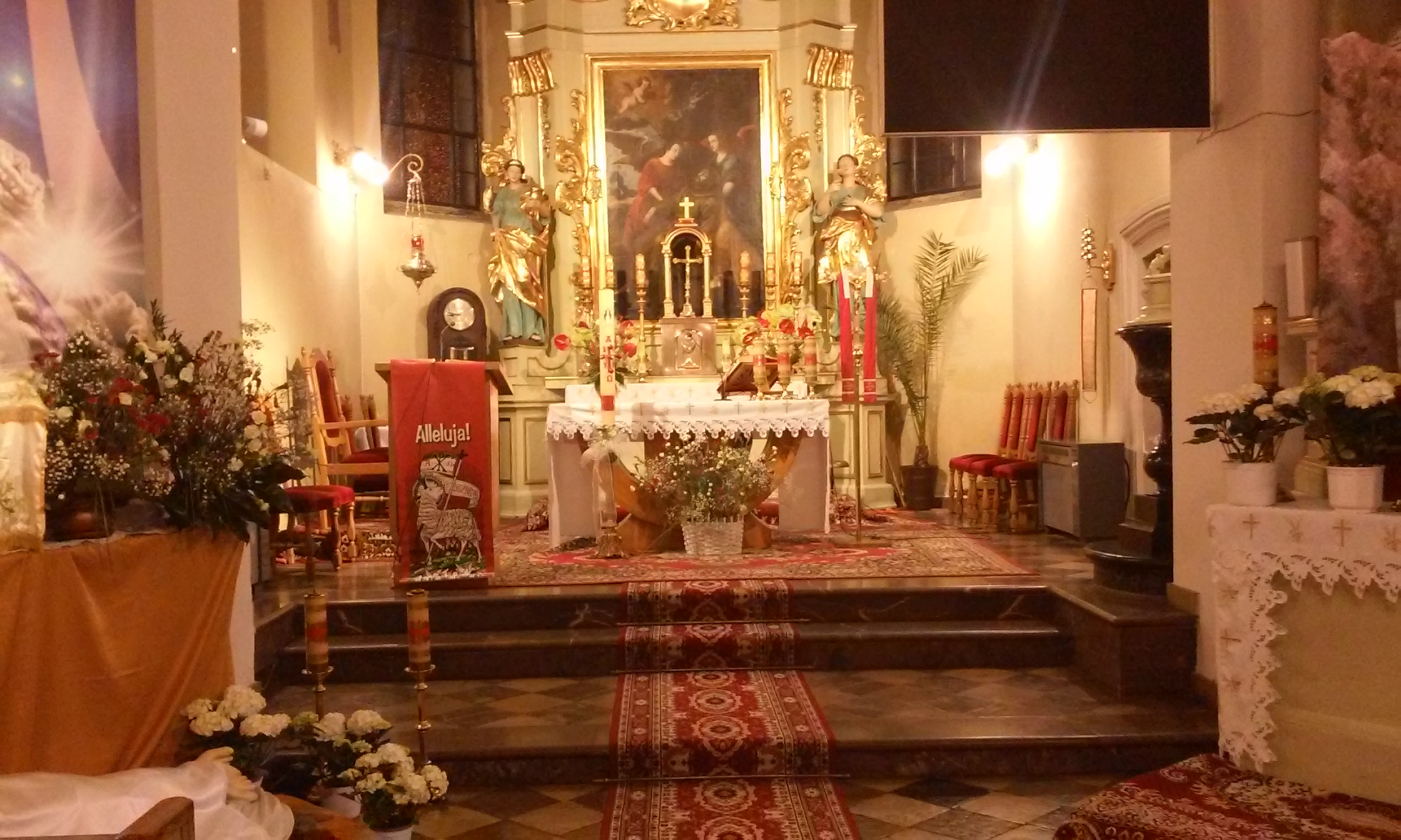 Prezbiterium kościoła w Michałowie podczas świąt Wielkanocnych